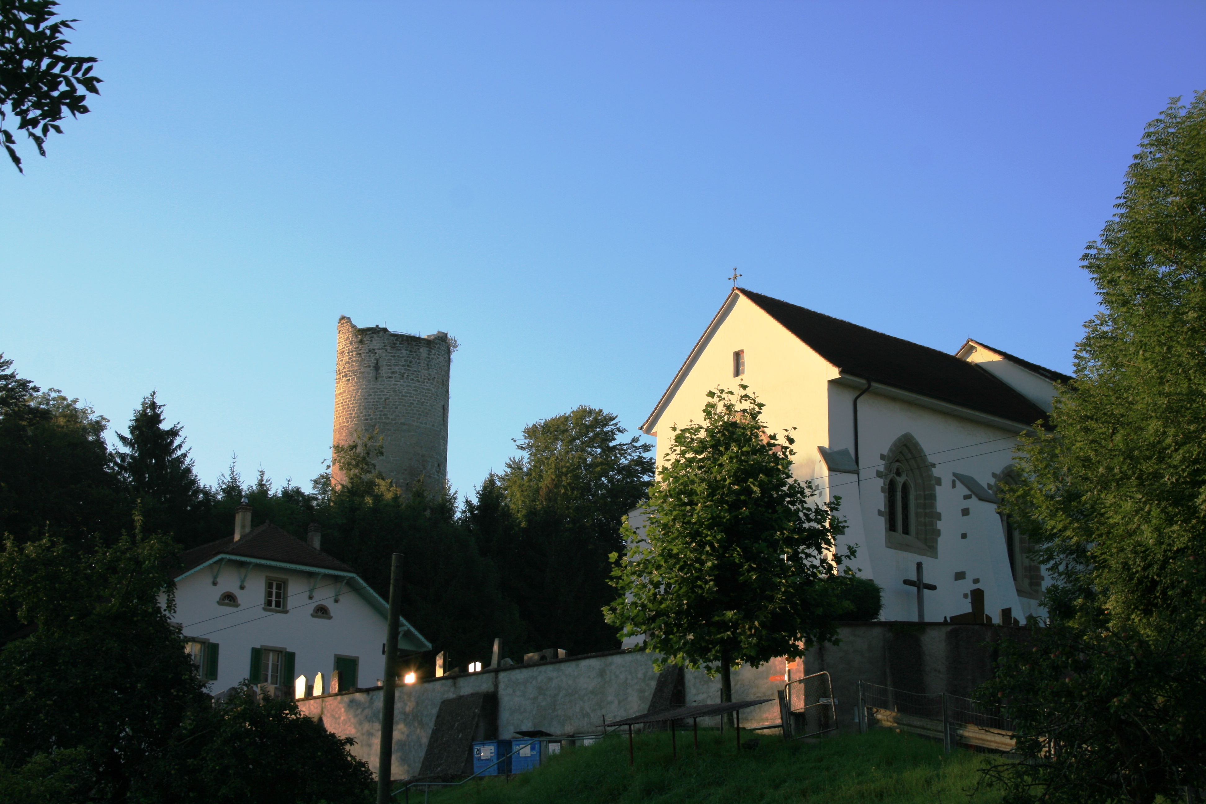 Montagny (-les-Monts) FR, Kirche und Burg, Schweiz